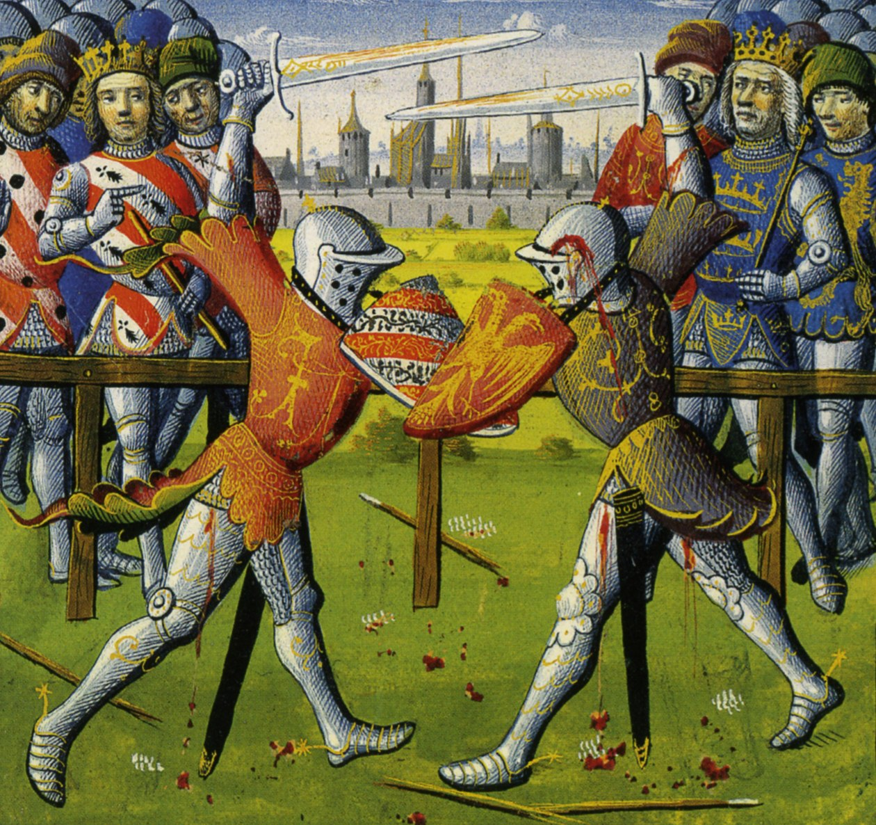 fol. 118